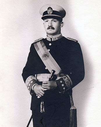 Juan Carlos Onganía, dictador en la República Argentina entre 1966 y 1971, encabezó la autoproclamada Revolución Argentina que derrocó al presidente constitucional Arturo Illia.